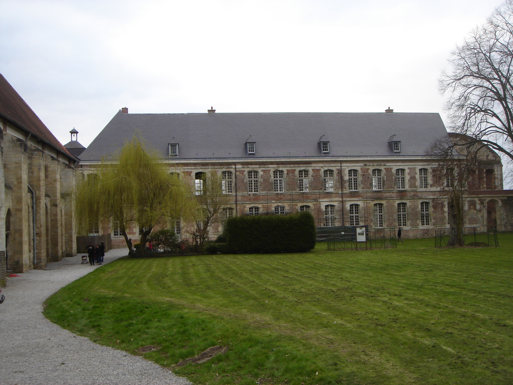 Abbaye de Vaucelles façade arrière du palais abbatial